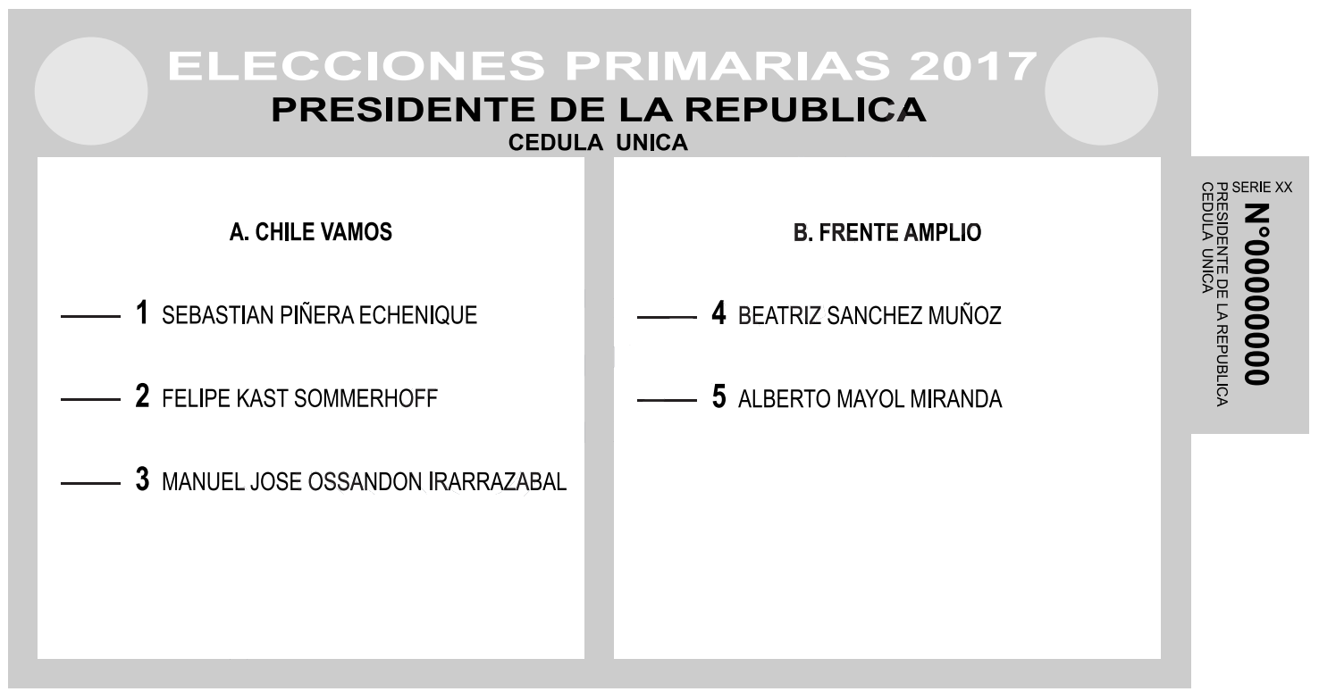 Cédula única de votación para las elecciones primarias presidenciales de 2017, entregada sólo a los votantes que no son miembros de algún partido político.